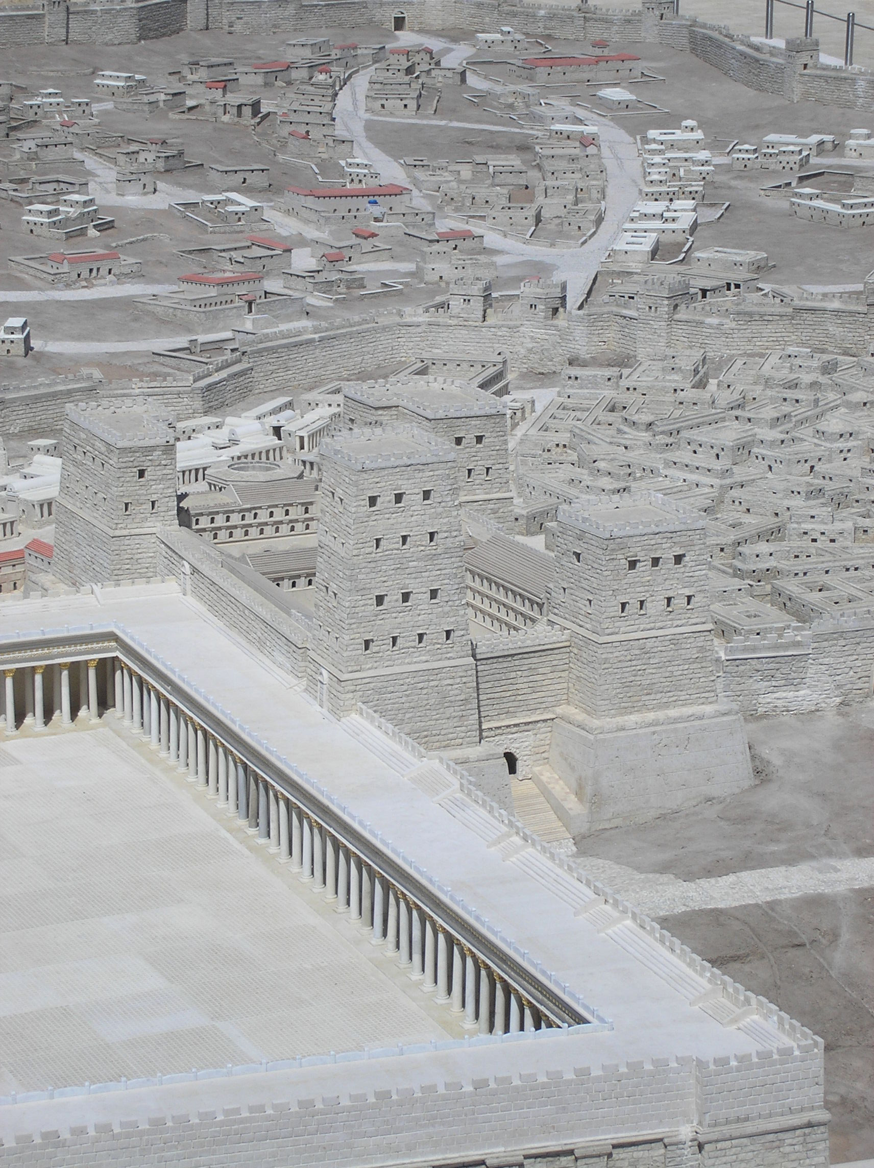 צילום מצודת אנטוניה מהדגם של אבי יונה (הולילנד), בתוספת אילוסטרציה על פי היצמדות לדברי יוספוס - גובה המגדל הדרום-מזרחי - 70 אמה